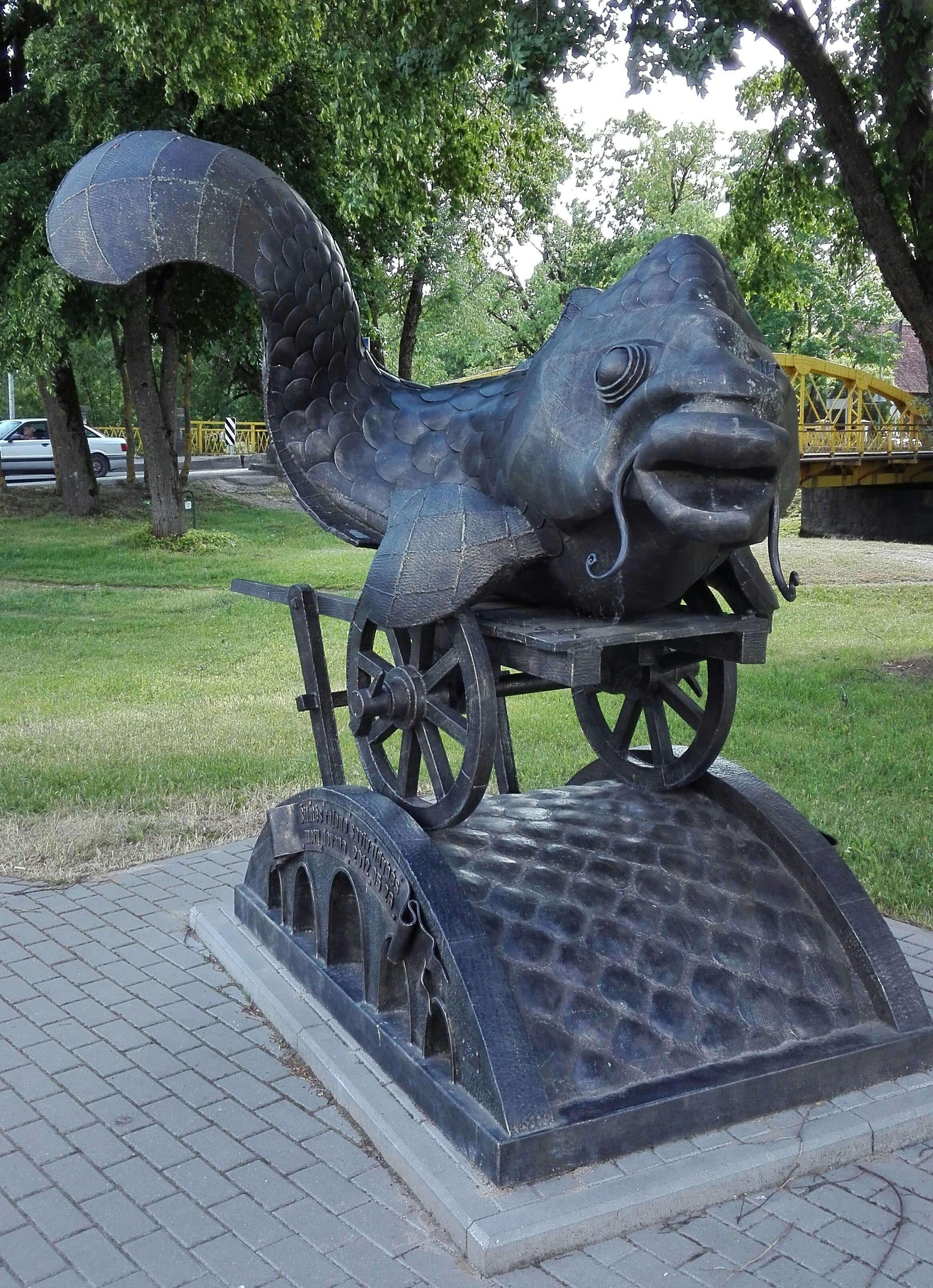 Paminklas žuvis prie geltojo tilto Šilutėje